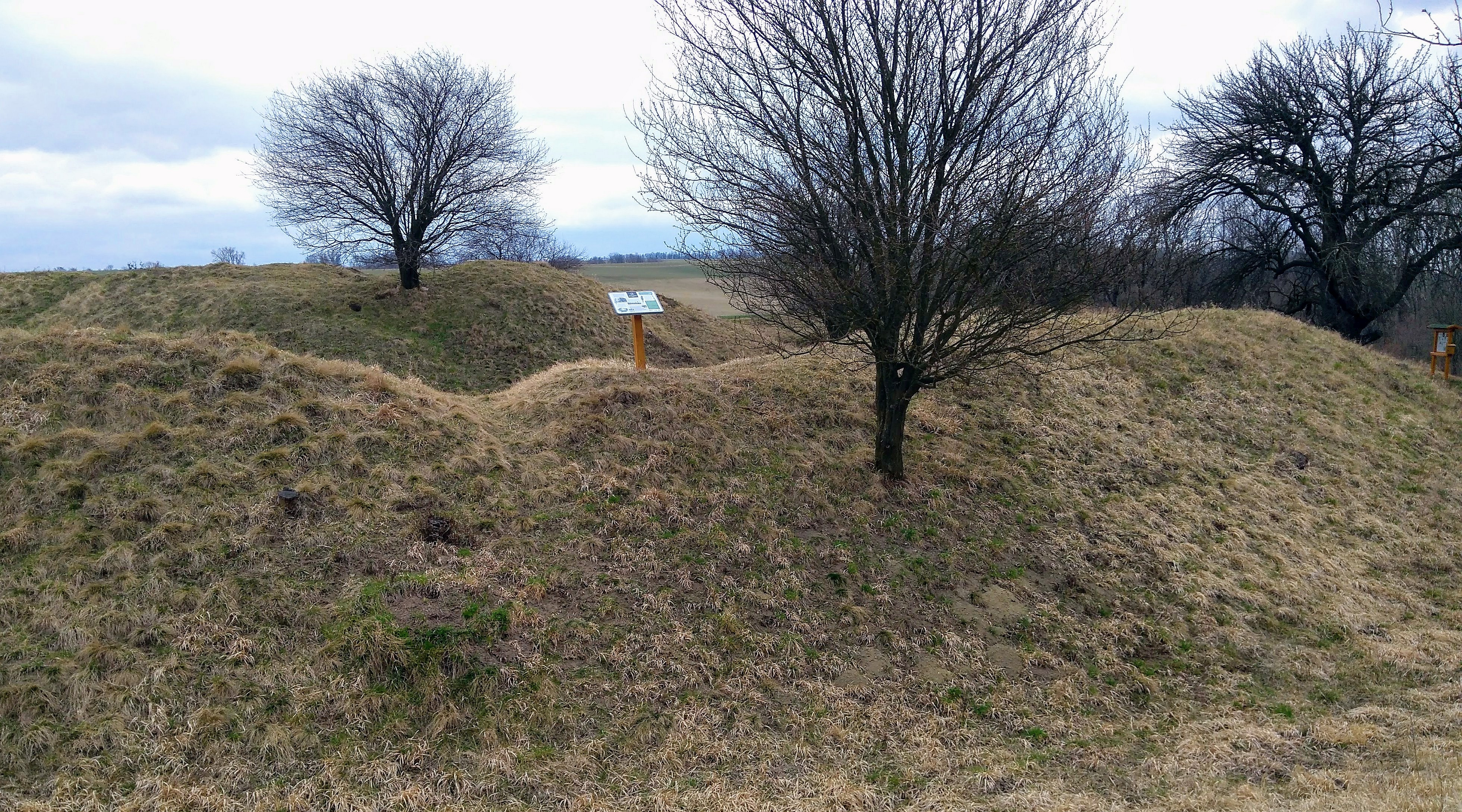 Tvrz, zřícenina, nad vsí, Dobrotice, Dobrotice (Holešov).